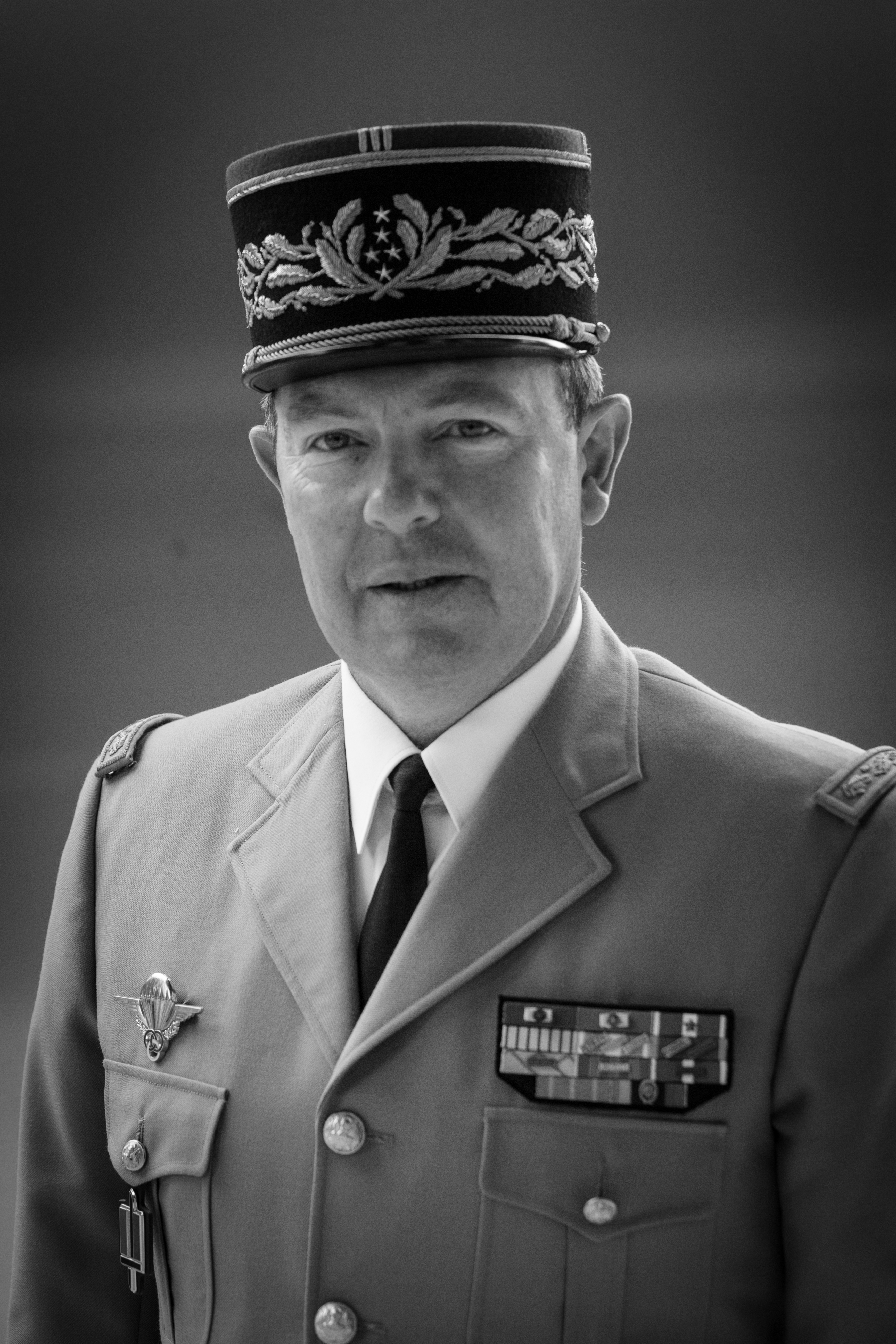 Jean-Pierre Bosser par Claude Truong-Ngoc en septembre 2015